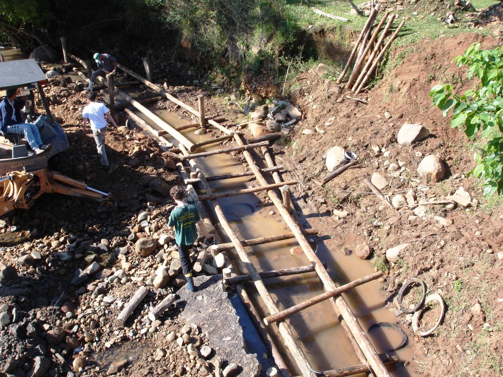 Estabilização da base de um talude fluvial (Vale Vêneto-RS / Brasil)